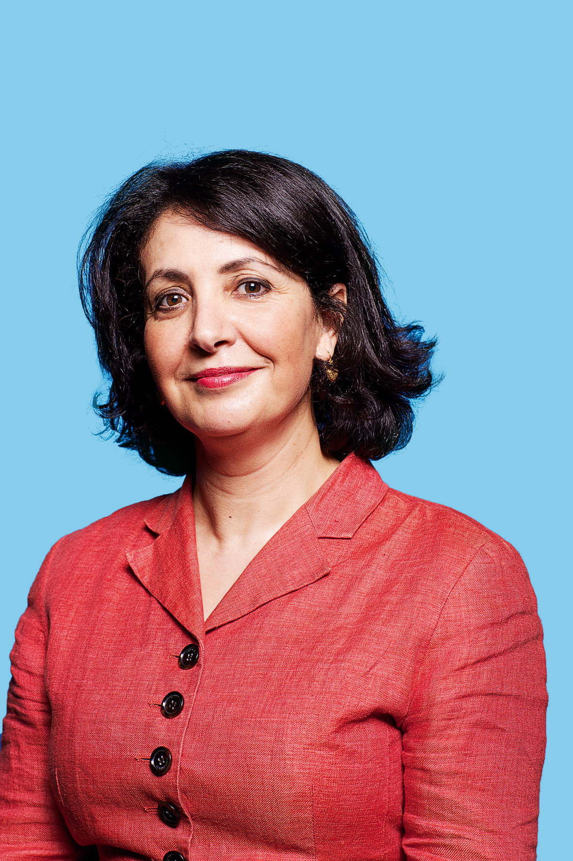 Tweede Kamerlid. Foto: Lex Draijer.